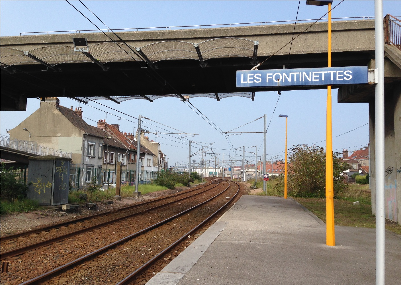 法国雷丰提内特站（Gare des Fontinettes）